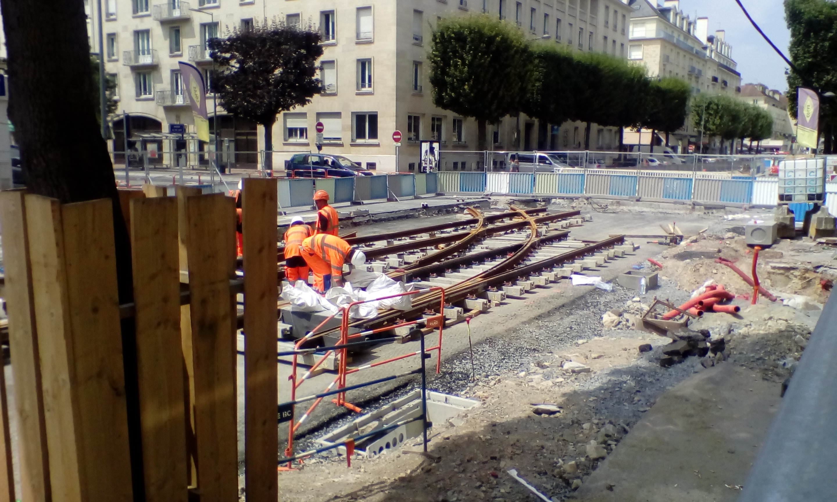 aiguillage pour la future extension du tramway de Caen à l'angle de la rue de Bernières et de l'avenue du 6-Juin